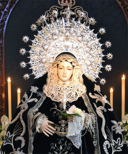 Virgen de la Soledad, Titular de la Hermandad del mismo nombre de San Fernando (Cádiz)